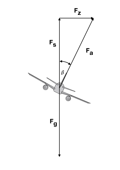 Kurvenflug